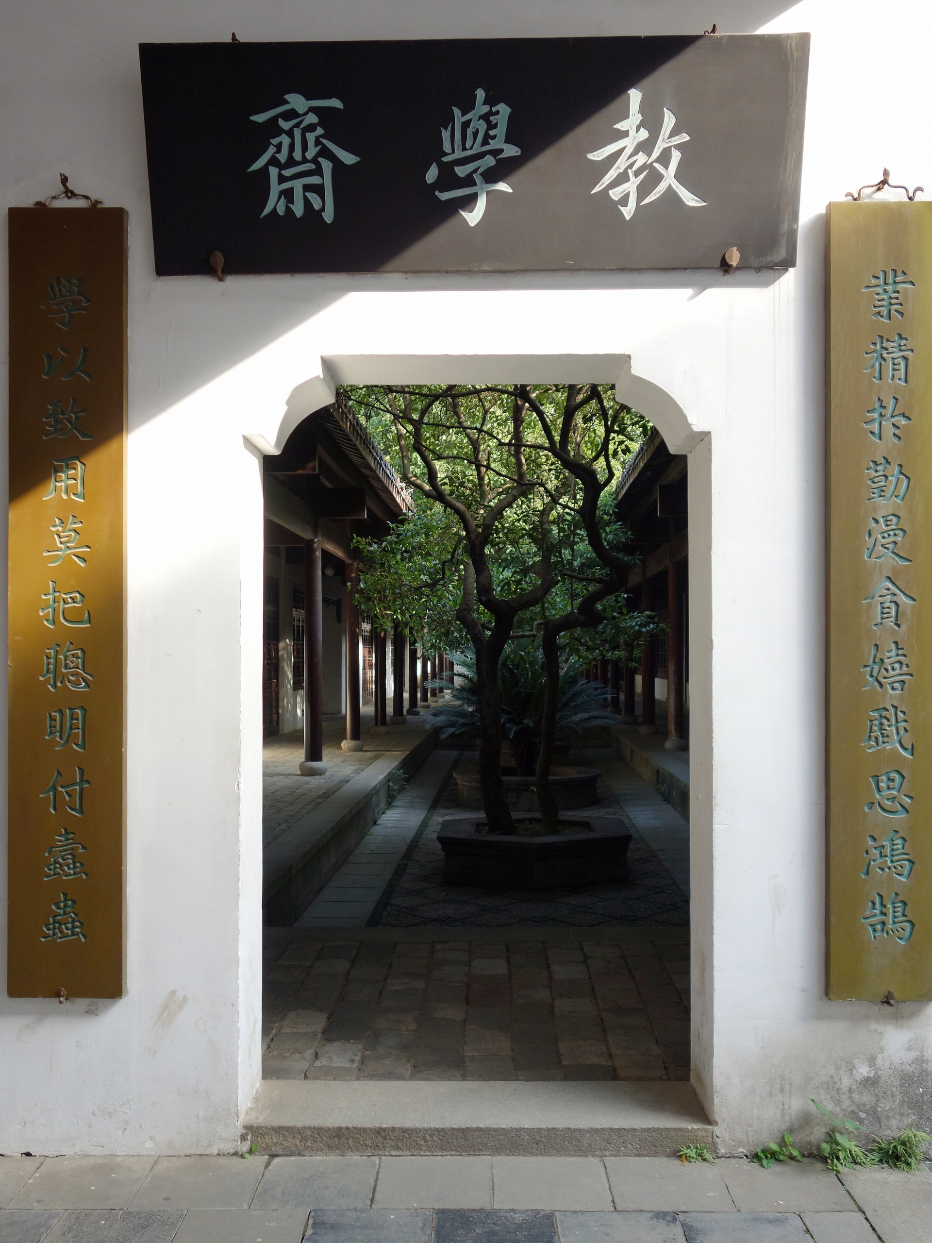 岳麓书院教学斋。楹联：业精于勤，漫贪嬉戏思鸿鹄；学以致用，莫把聪明付蠹虫